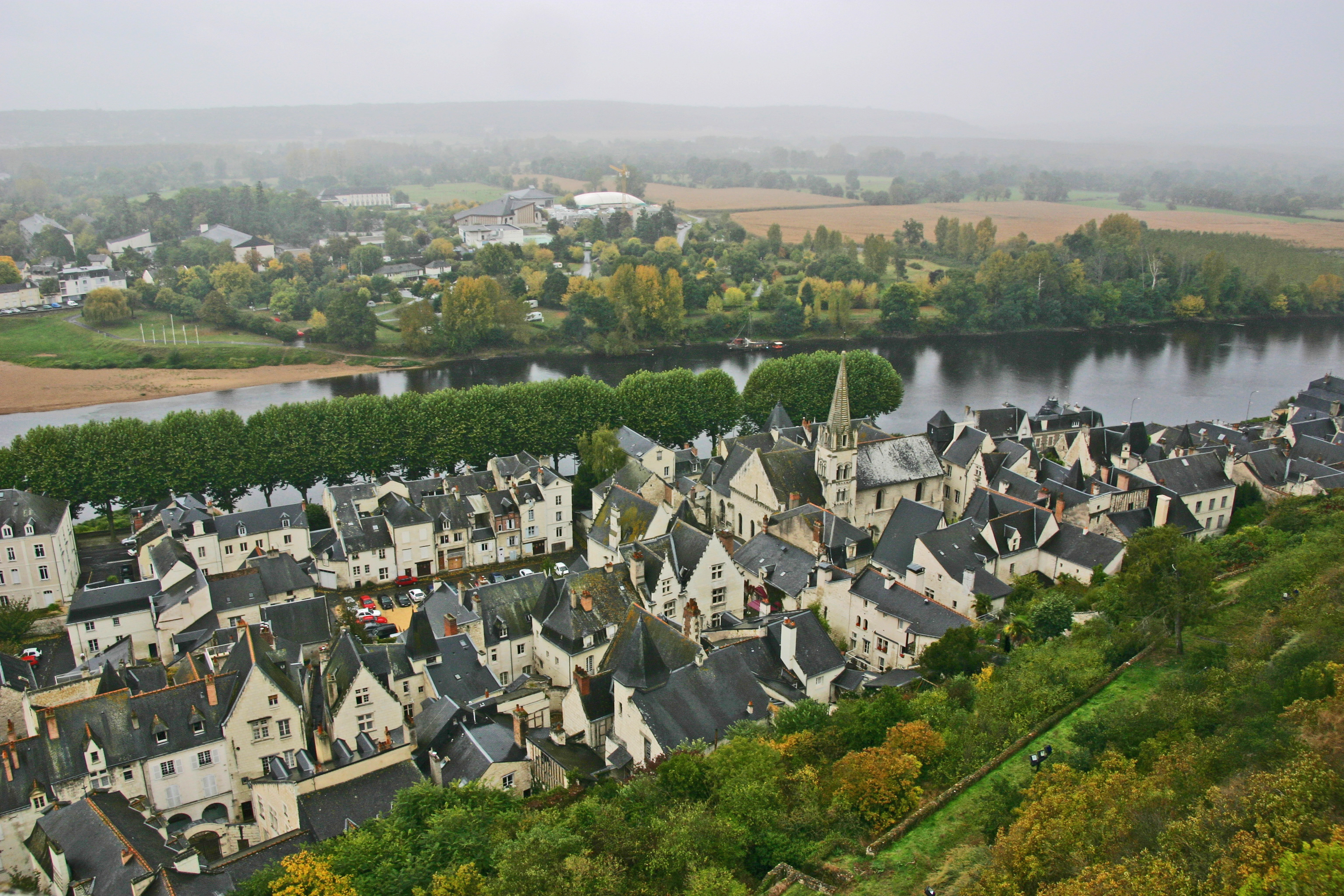 Chinon